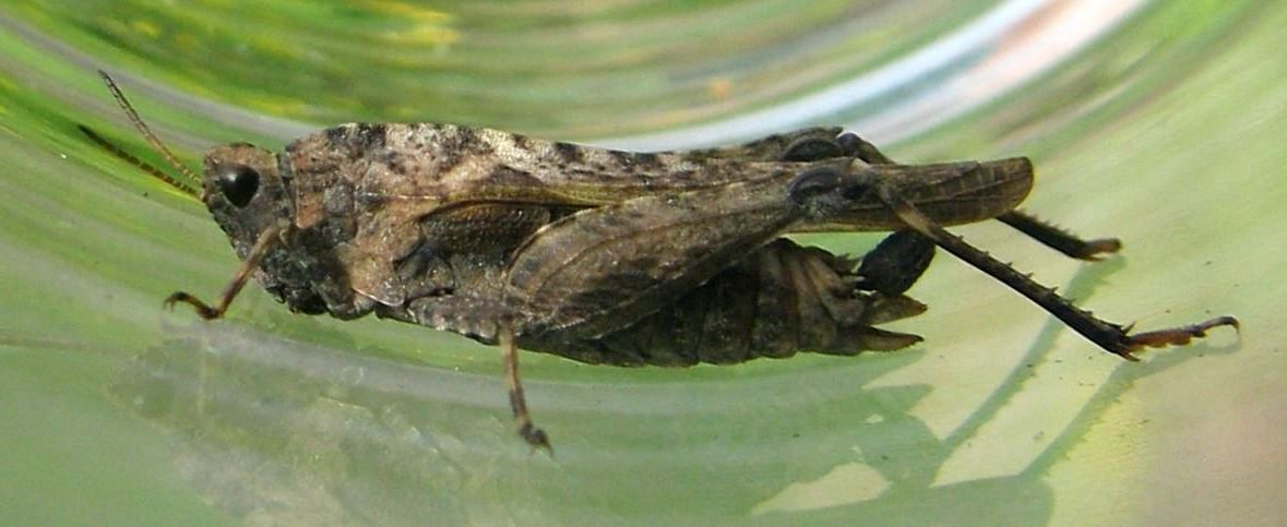 Hann av strandtorngresshoppe Tetrix subulata. Template:Byline